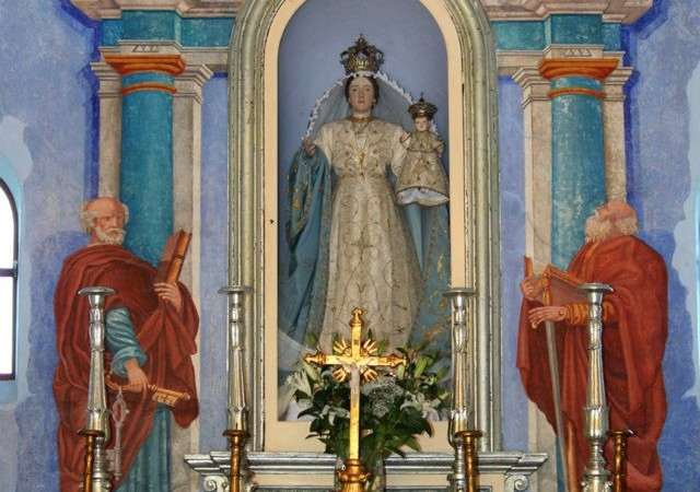 Affresco Roccavecchia